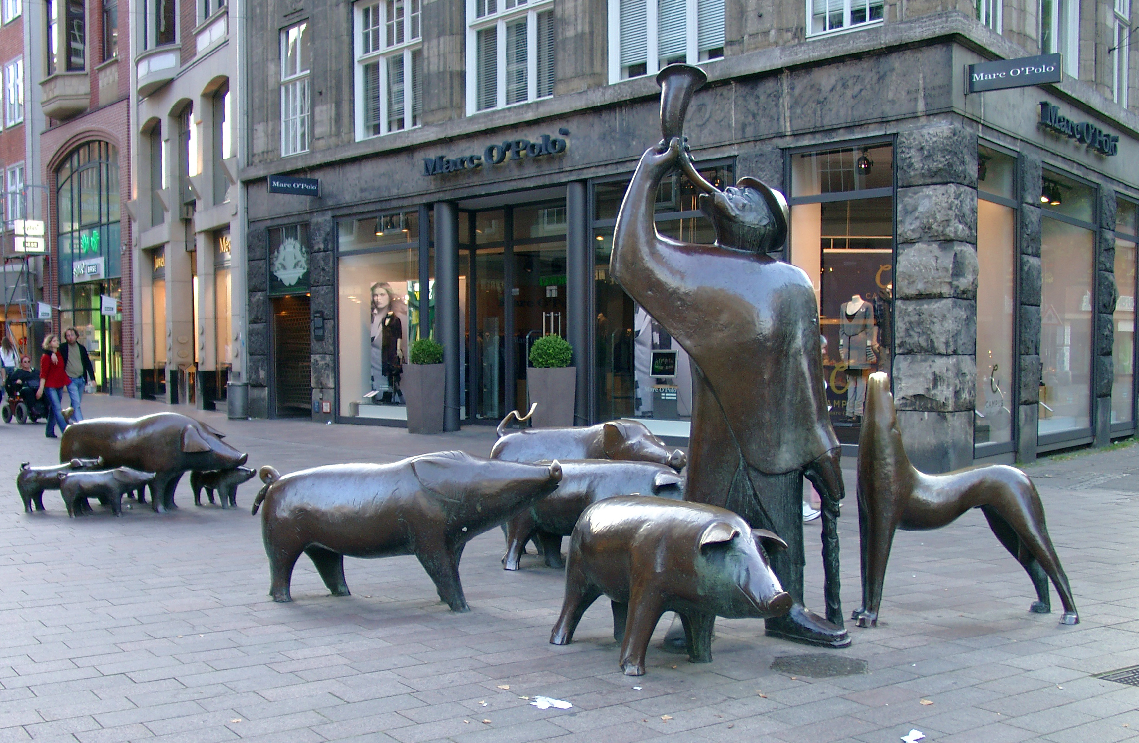 Sculpture "Schweinehirt und seine Herde", von Peter Lehmann, Sögestraße, Bremen, Germany